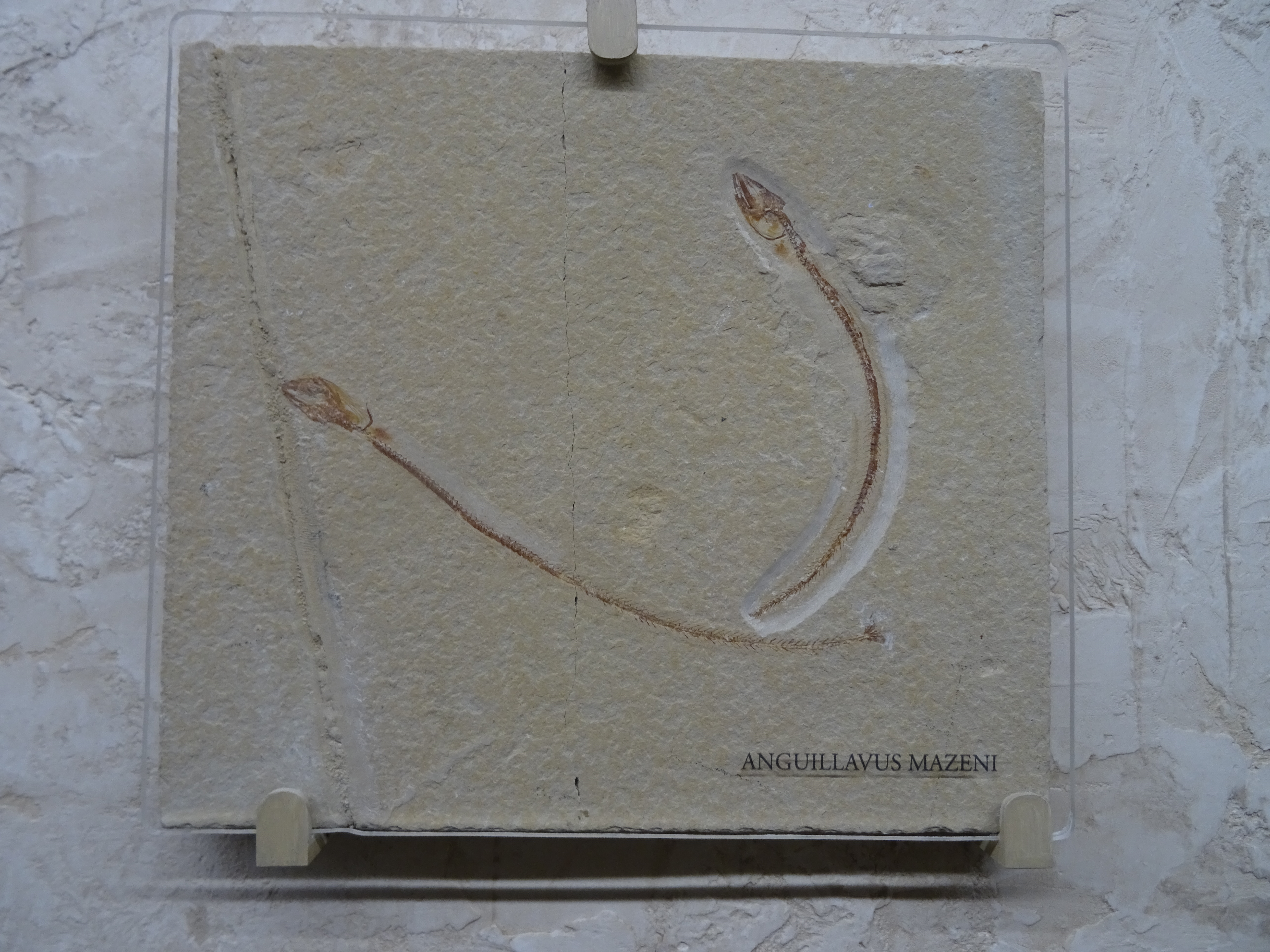 Fossile d'Anguillavus Mazeni genre éteint de poisson du Crétacé (Mim Museum - Musée des minéraux de Beyrouth)